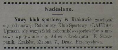 Tygodnik Sportowy nr 28 z 25 listopada 1921, informacja o założeniu Garbarni Kraków